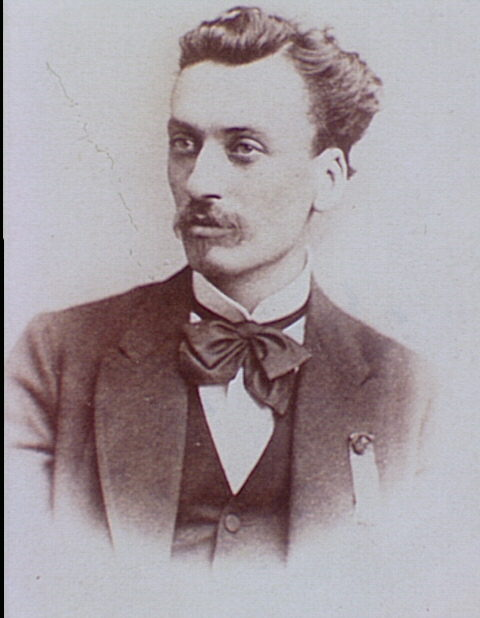 Louis-Denis Chalain (1845-1885)